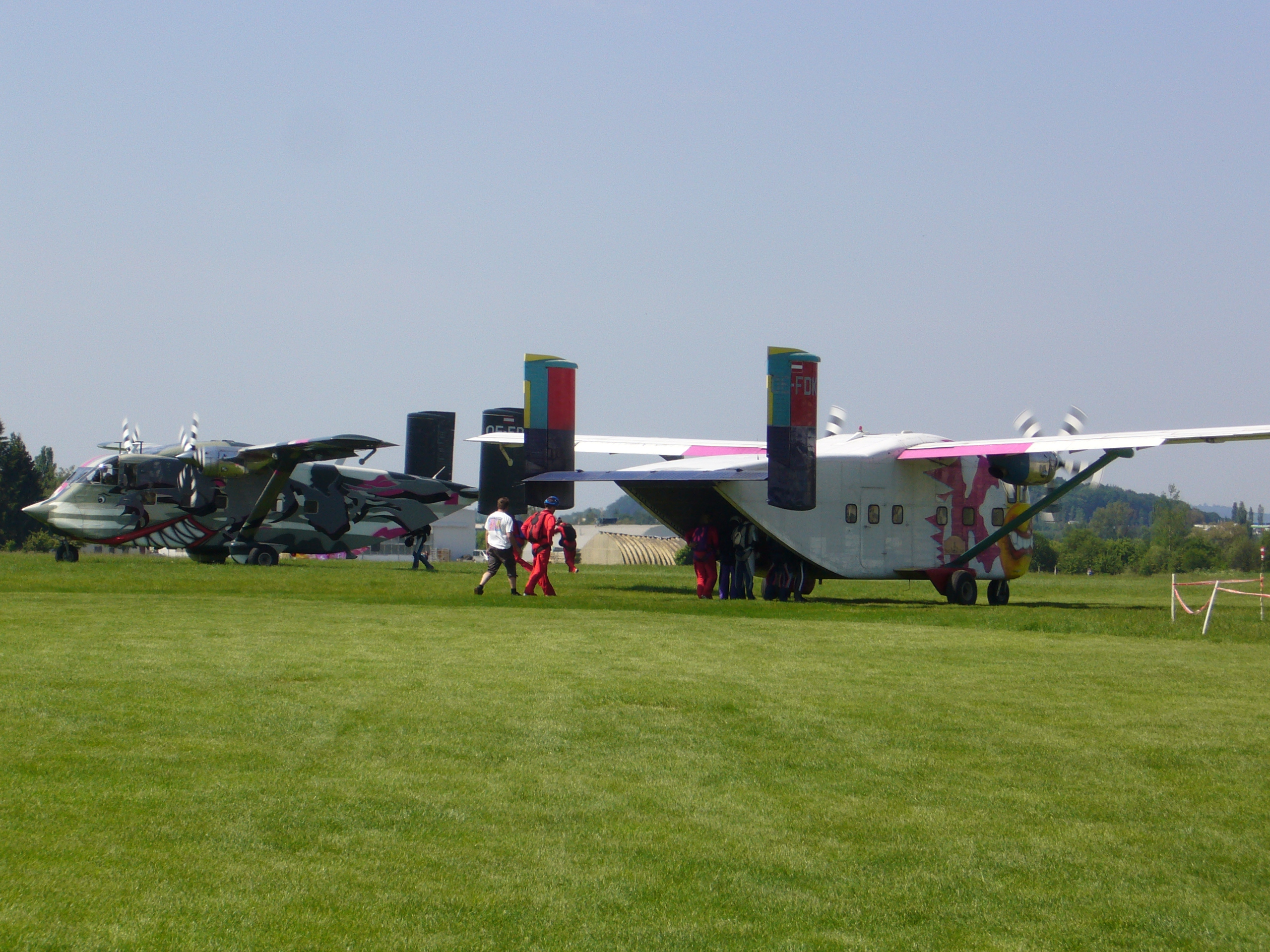 Zwei Short Skyvans beim Einsteigen von Fallschirmspringern. Gut sieht man die offene Ladeluke.